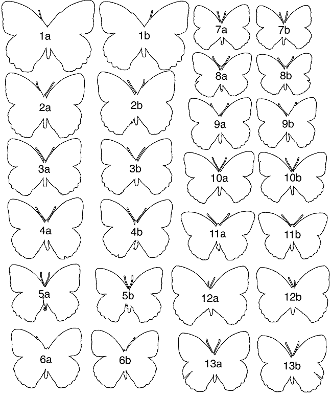 Maniola species. 1. M. jurtina France (male), 2. M. jurtina France (female), 3. M. jurtina Sardinia (male), 4. M. jurtina Sardinia (female), 5. M. telmessia (male), 6. M. telmessia (female), 7. M. nurag (male), 8. M. nurag intermediate form (male), 9. M. nurag (female), 10. M. chia (male), 11. M. chia (female), 12. M. halicarnassus (male), 13. M. halicarnassus (female), 14. M. cypricola (male), and 15. M. cypricola (female).